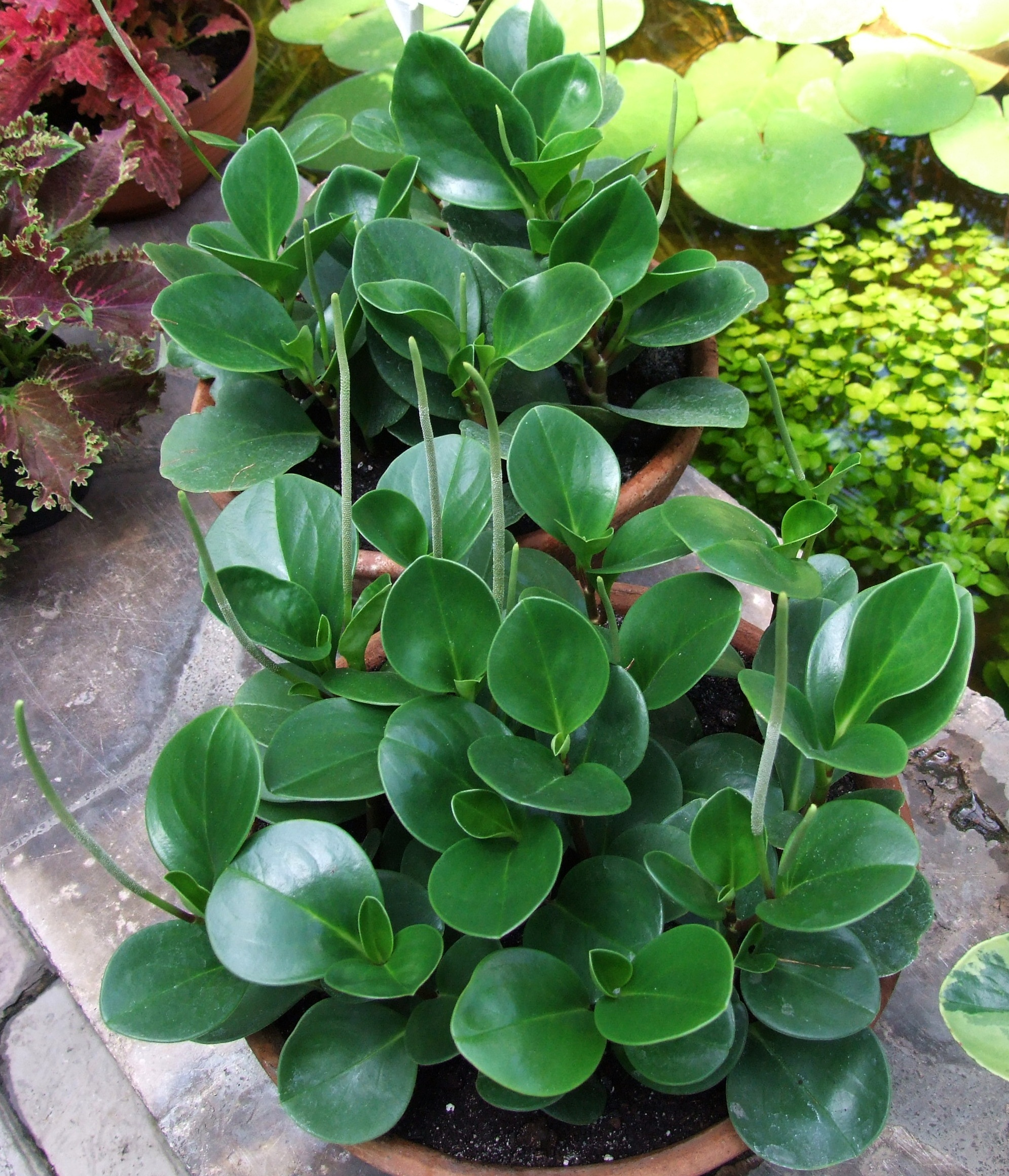 Peperomia obtusifolia